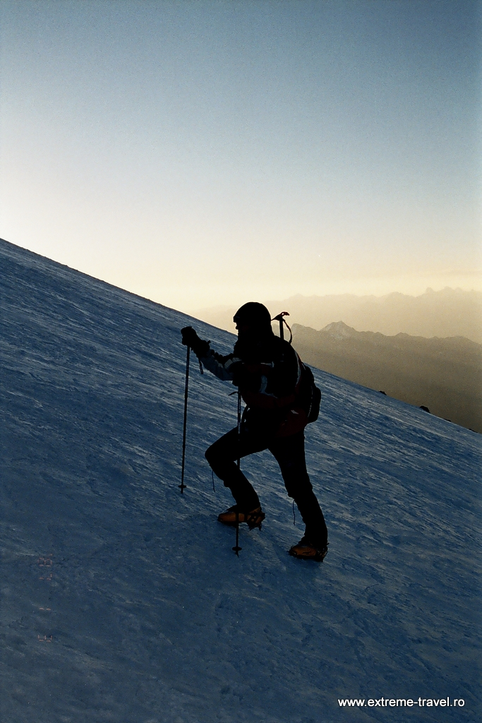 Inainte de asaltul final pe Elbrus